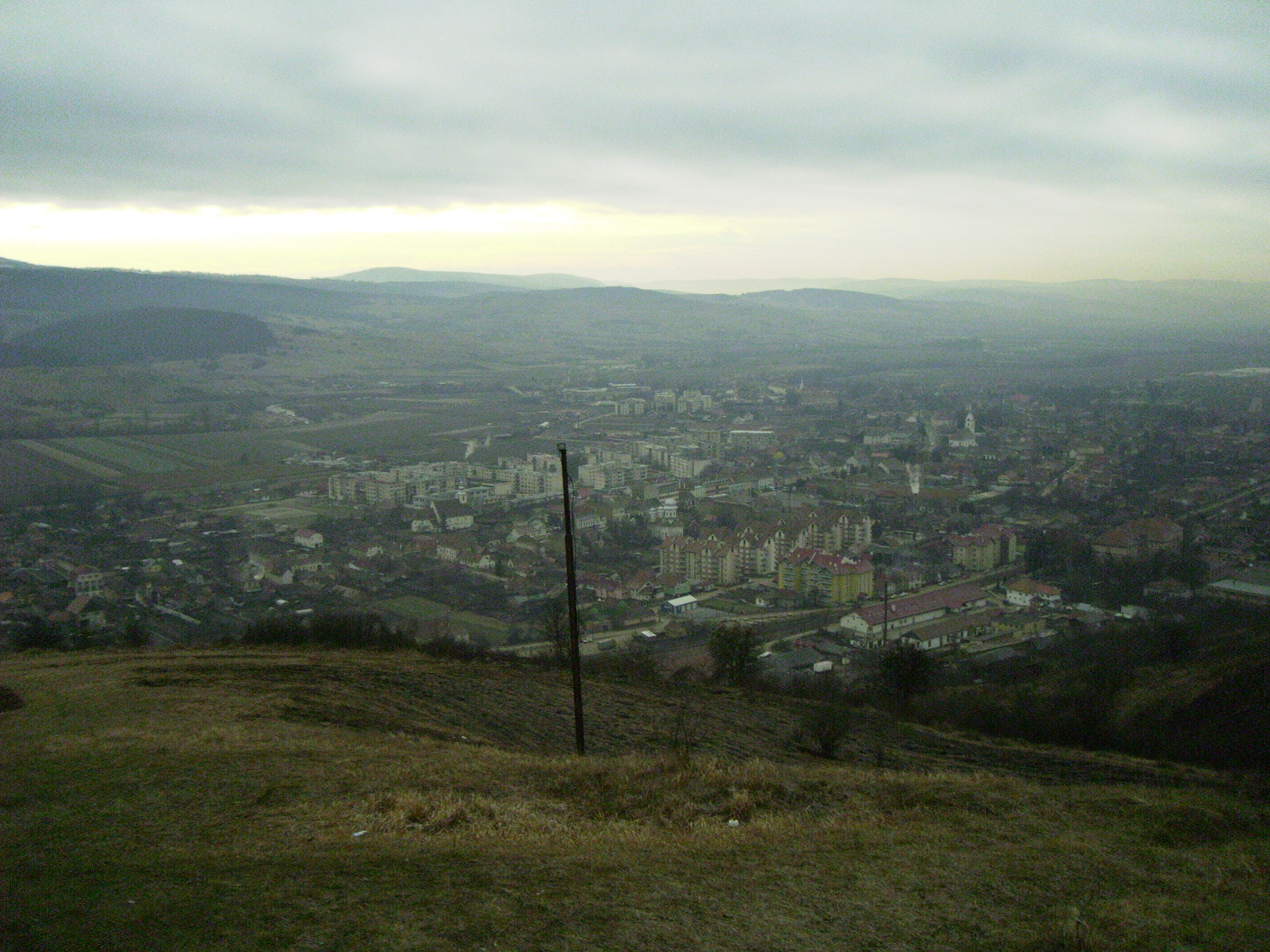 Blick über Keresztur (Cristuru Secuiesc, Rumänien) auf das Fagaras-Gebirge (Karpaten).